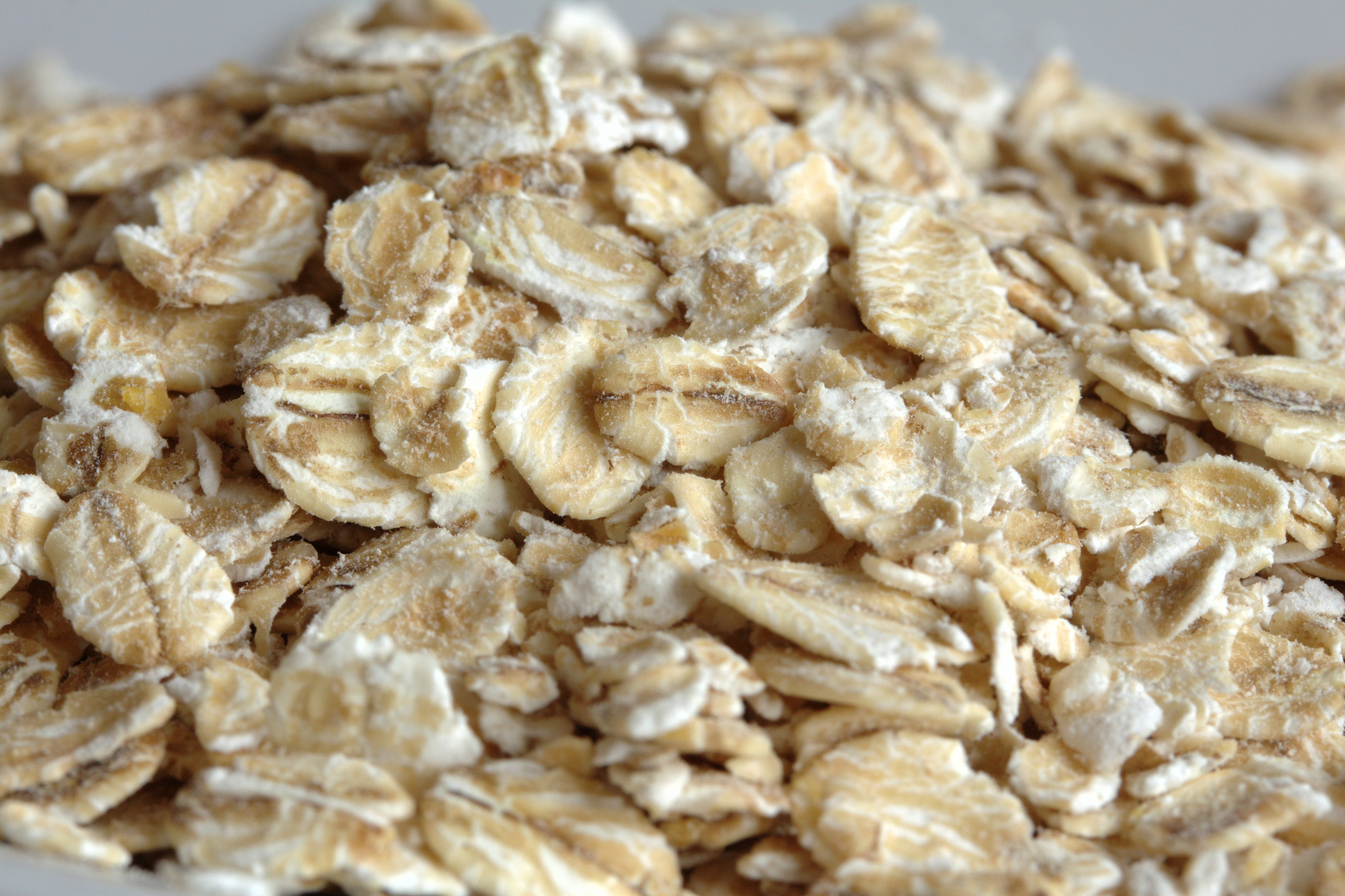 Haferflocken